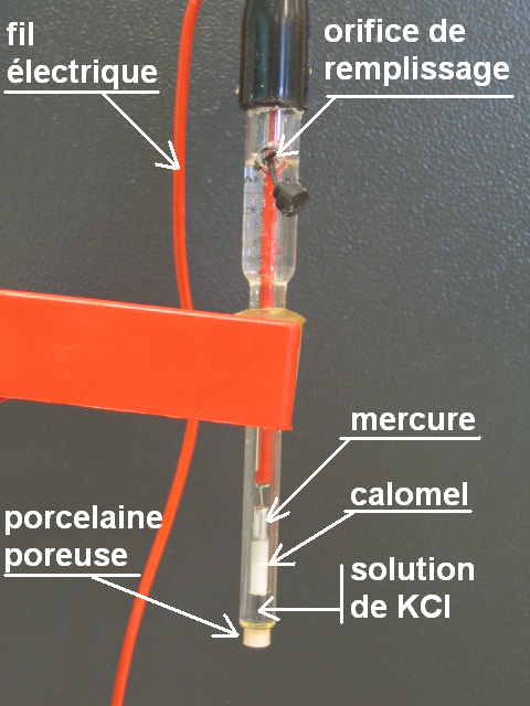 électrode de référence au calomel saturé (ECS)